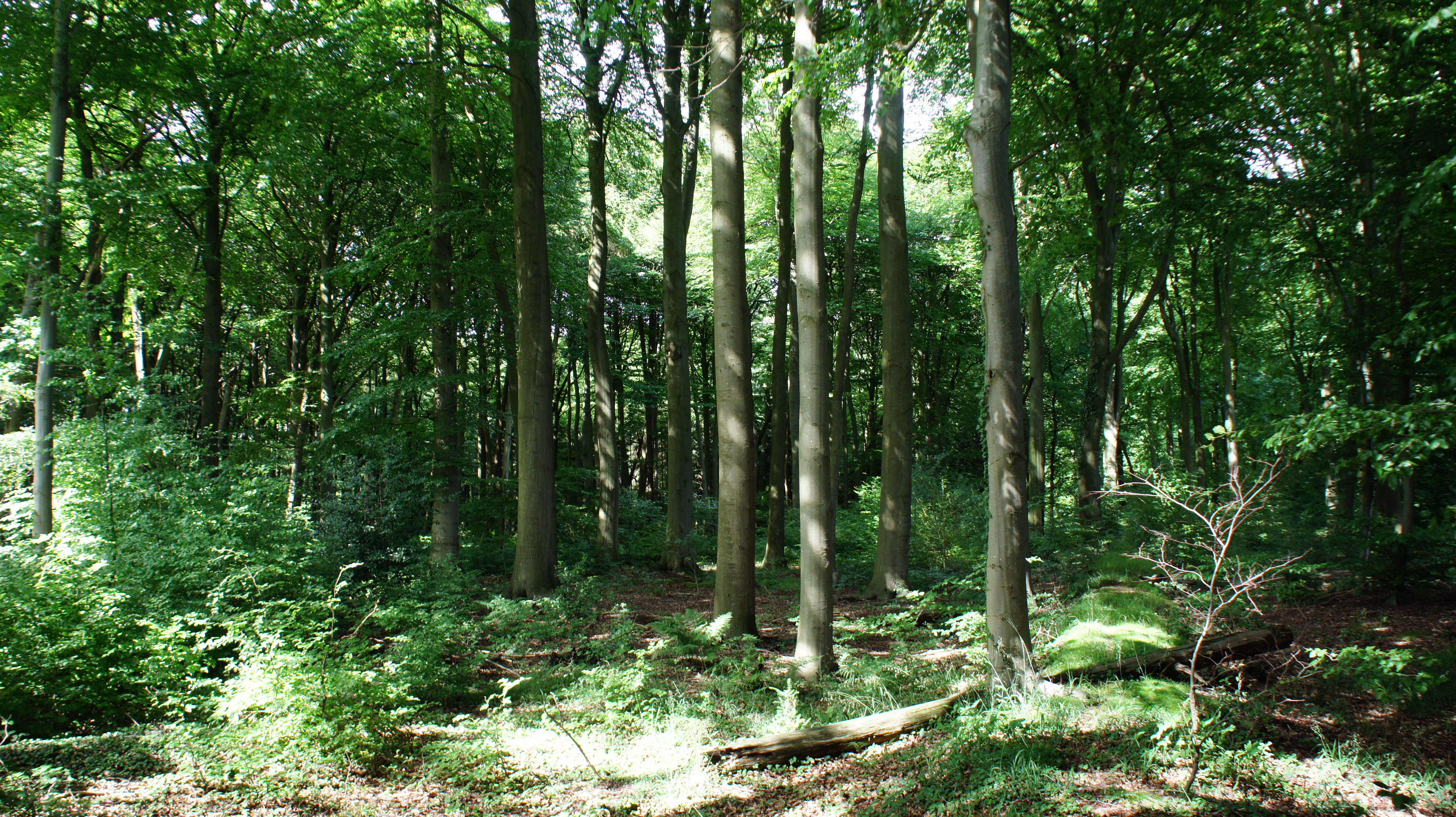 NSG WE071 Hatter Holz bei Kirchhatten, Gemeinde Hatten